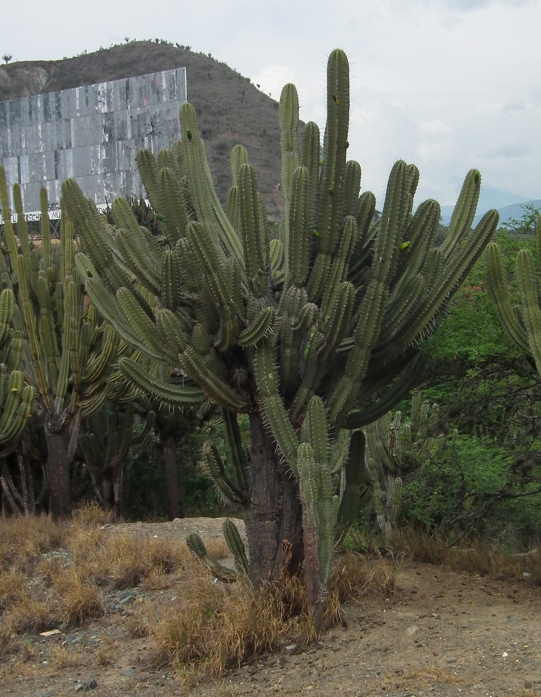 Paisaje Carretera El Vigia - Merdida